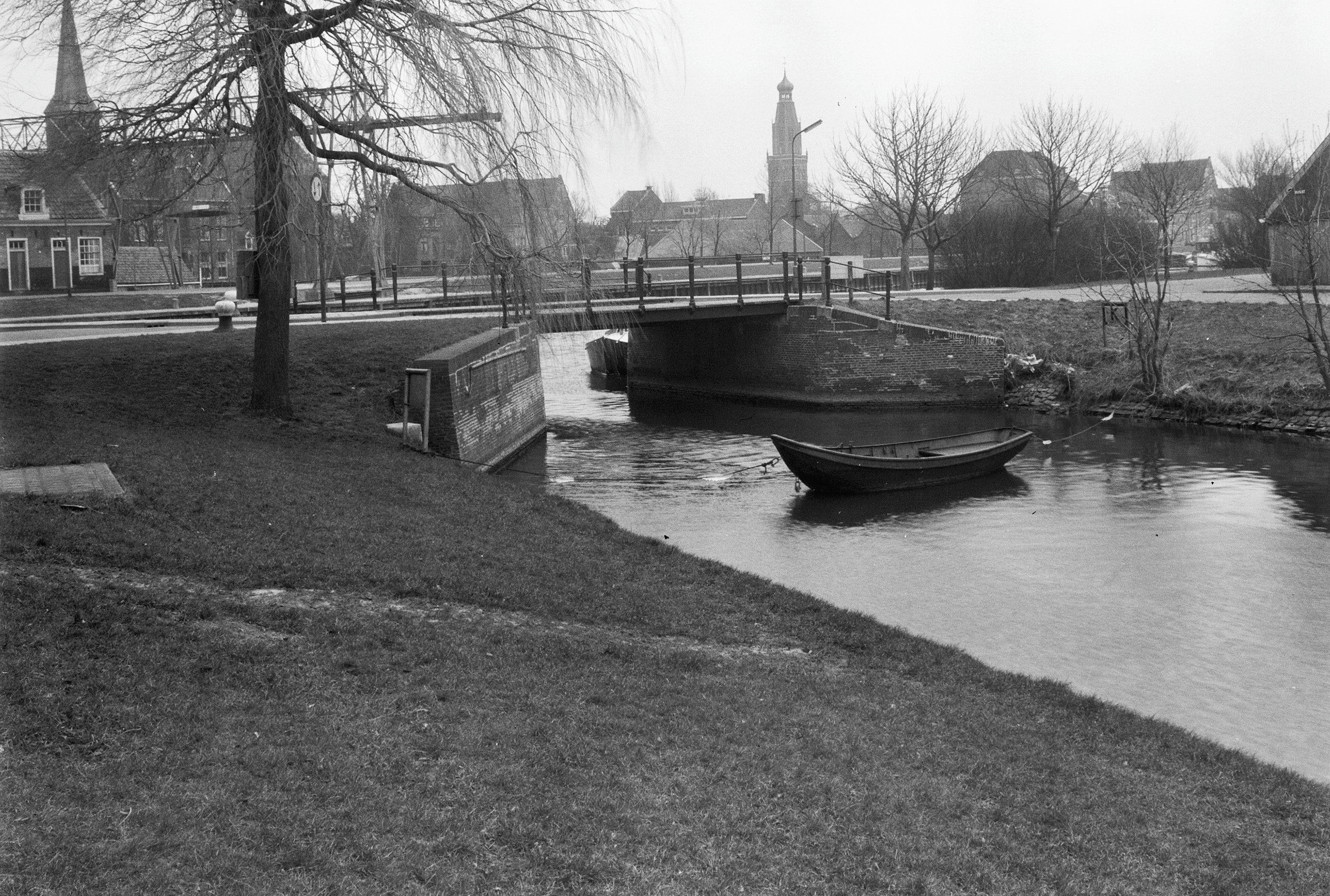 Bruggen: Brug over Waaigat